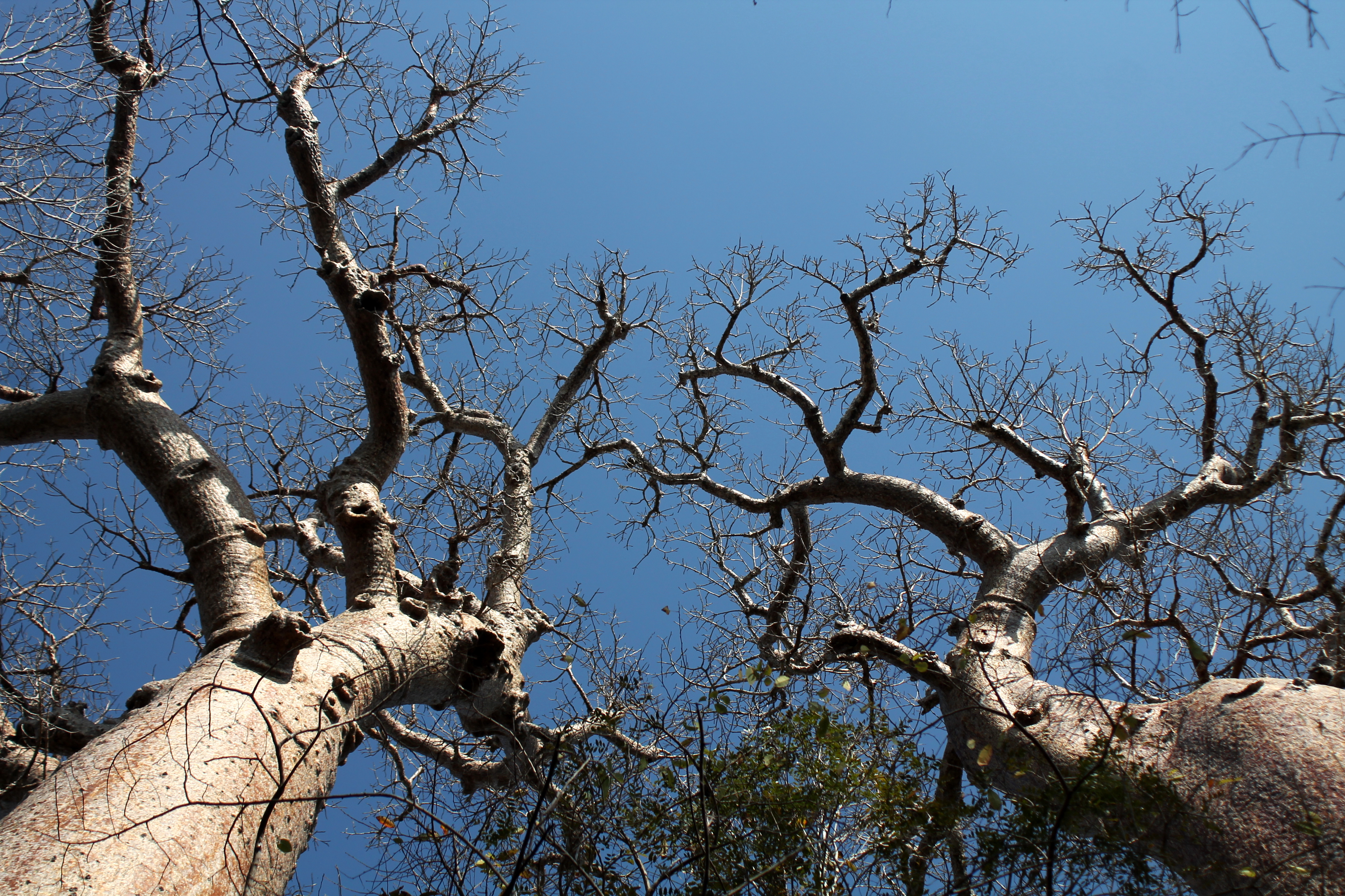 Fony baobab twin in Kirindy